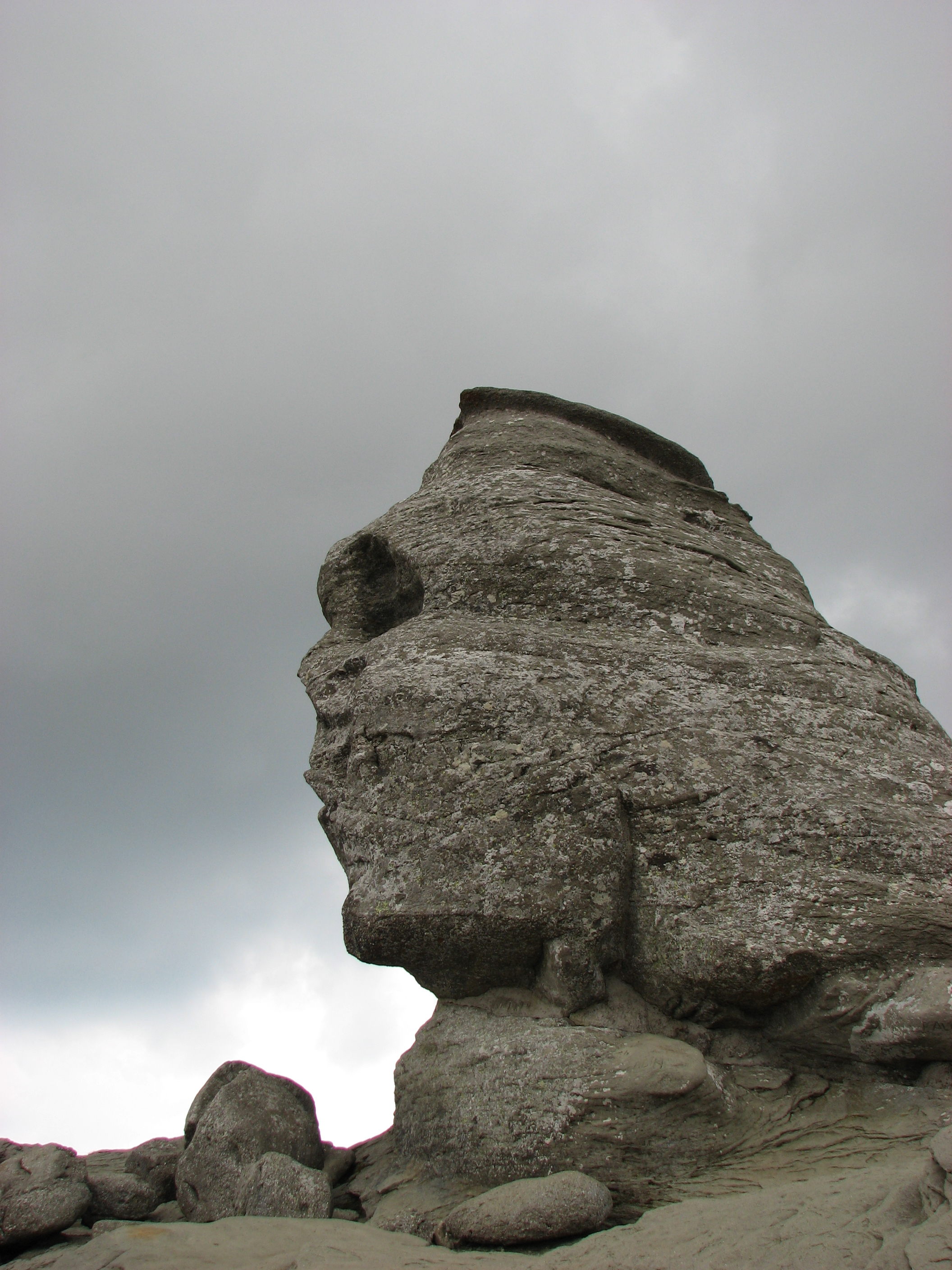 Bucegi Sphinx